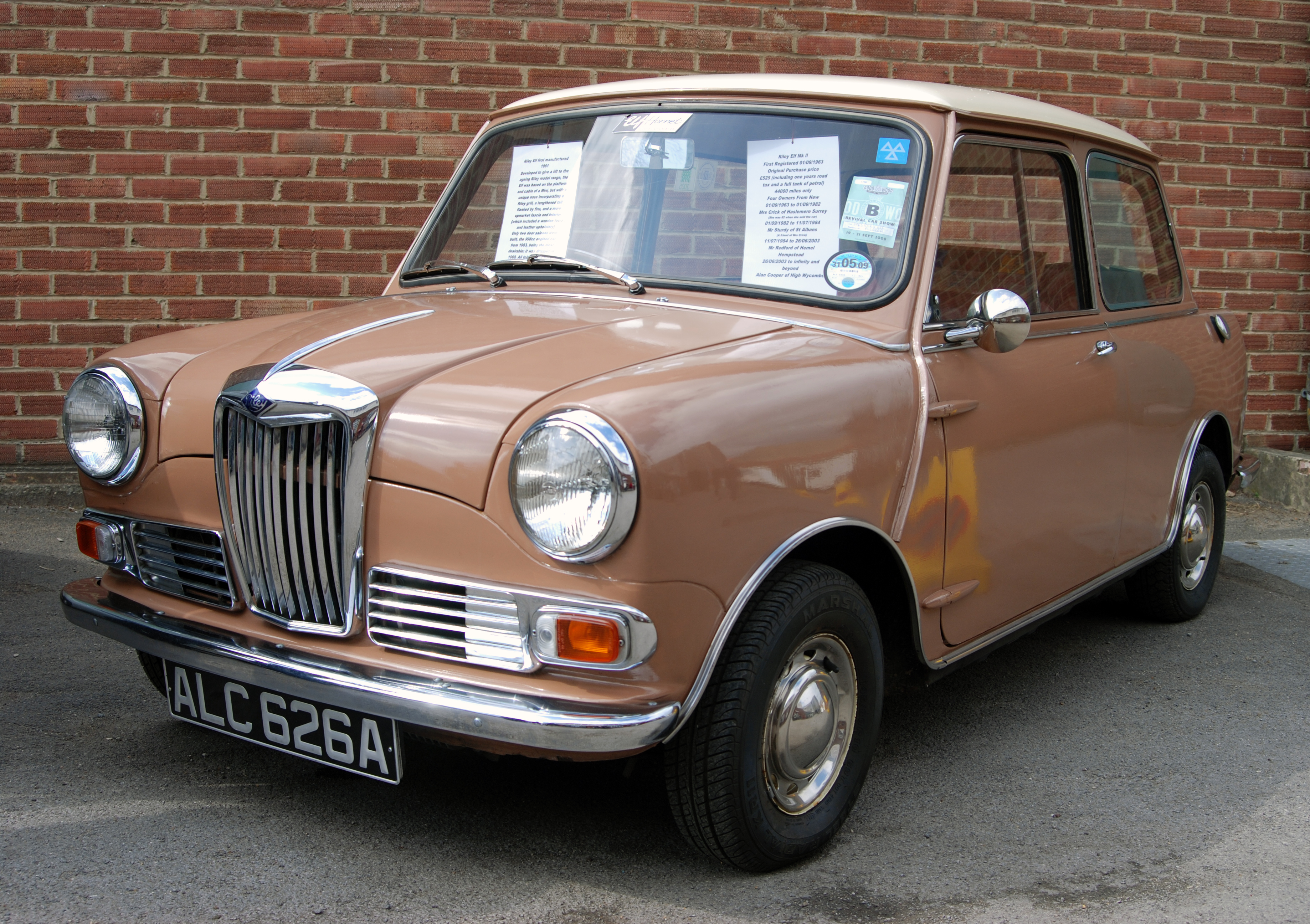 Brooklands,Mar 2009